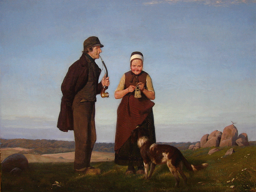 To gamle, der holder søndag, Otto Haslund, Ny Carlsberg Glyptotek, København